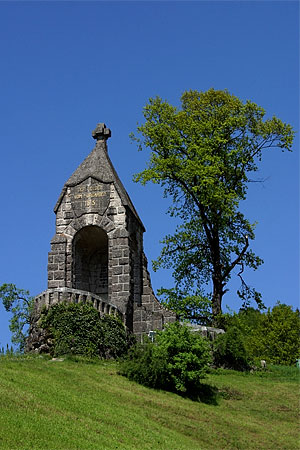 Schlachtdenkmal beim Morgarten am Aegerisee